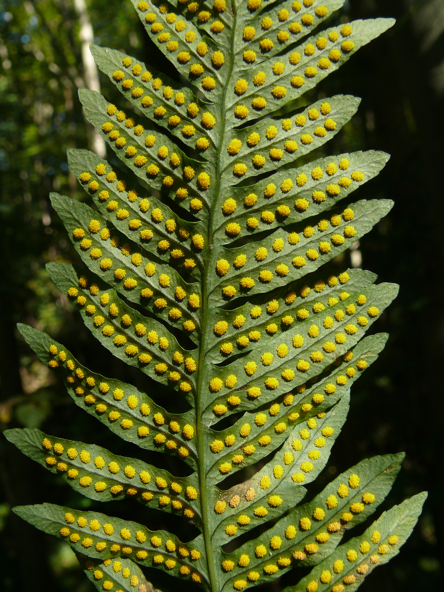 Polypodium vulgare, SoriHohenlohe, Deutschland